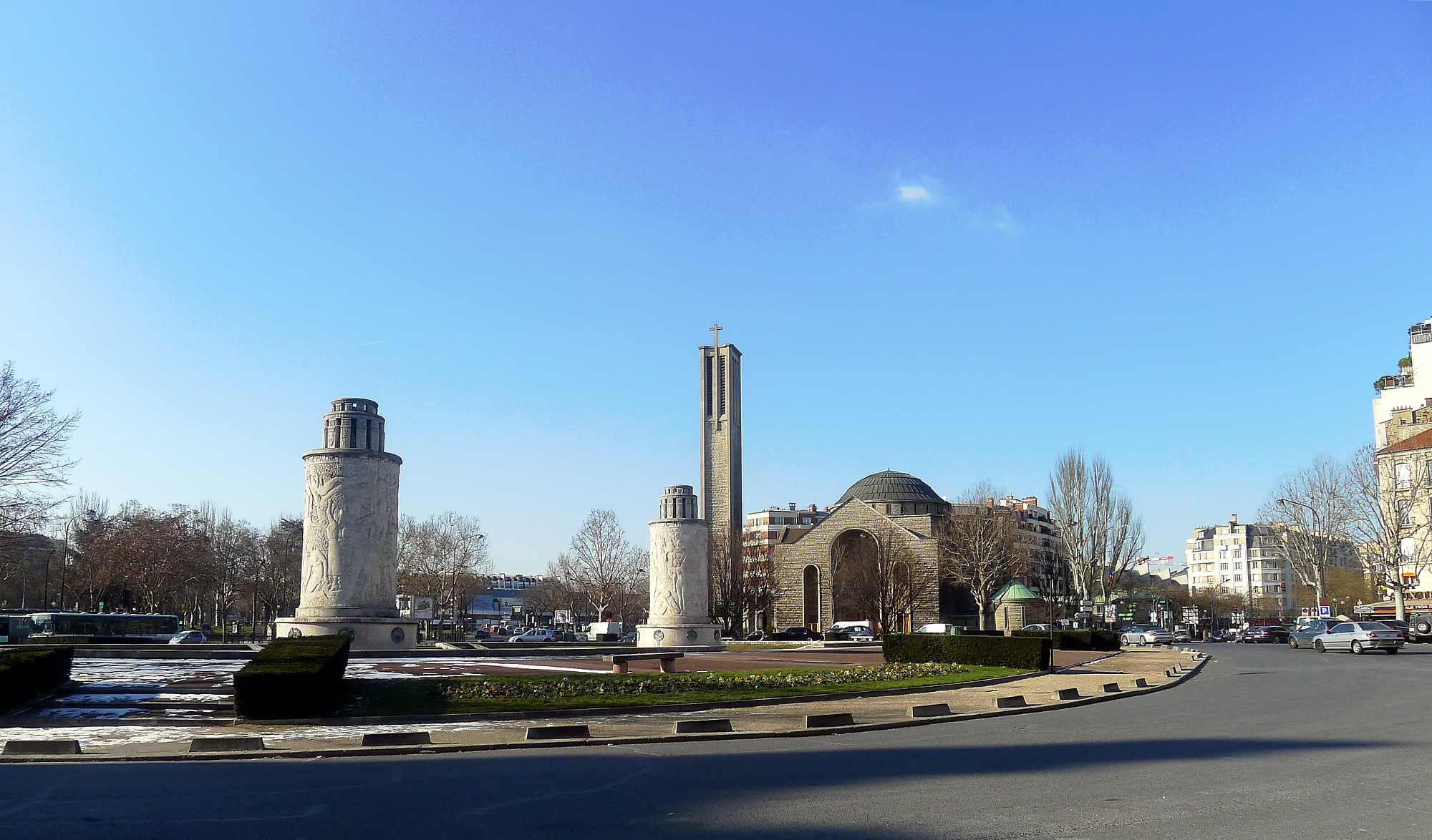 Place de la Porte de Saint-Cloud - Paris XVI